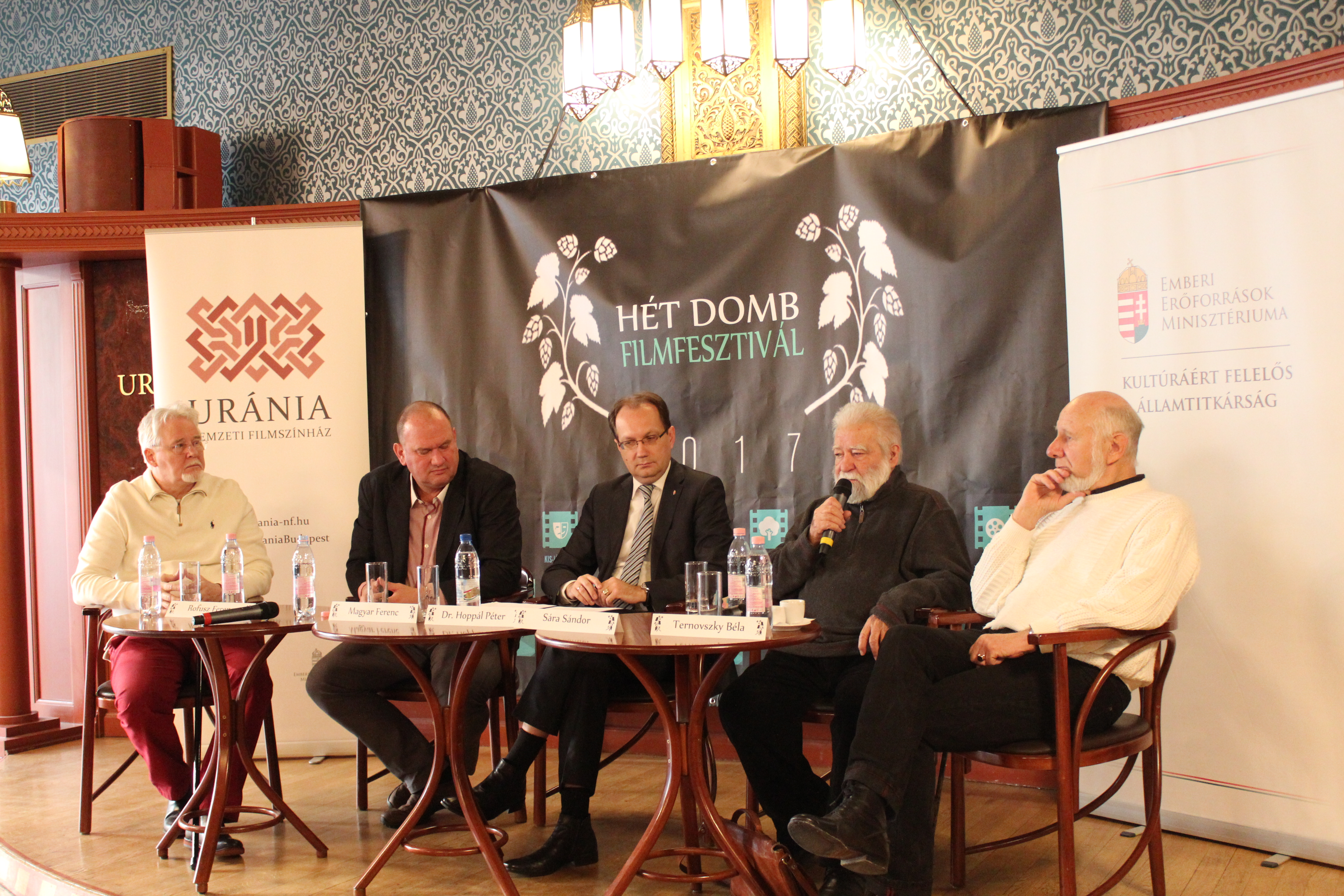 2017 januári sajtótájékoztató, Uránia Filmszínház Kávézó, Budapest (a képen balról: Rófusz Ferenc, Magyar Ferenc, Dr. Hoppál Péter, Sára Sándor, Ternovszky Béla)